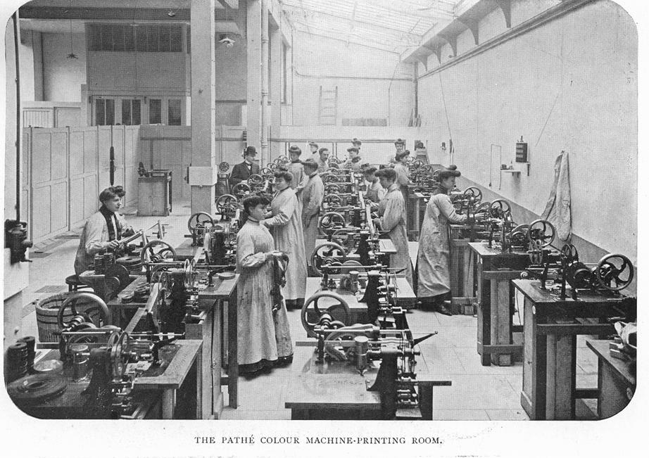 Coloristes au Laboratoire Pathé à Paris dans le livre « Moving pictures : how they are made and worked » p. 287